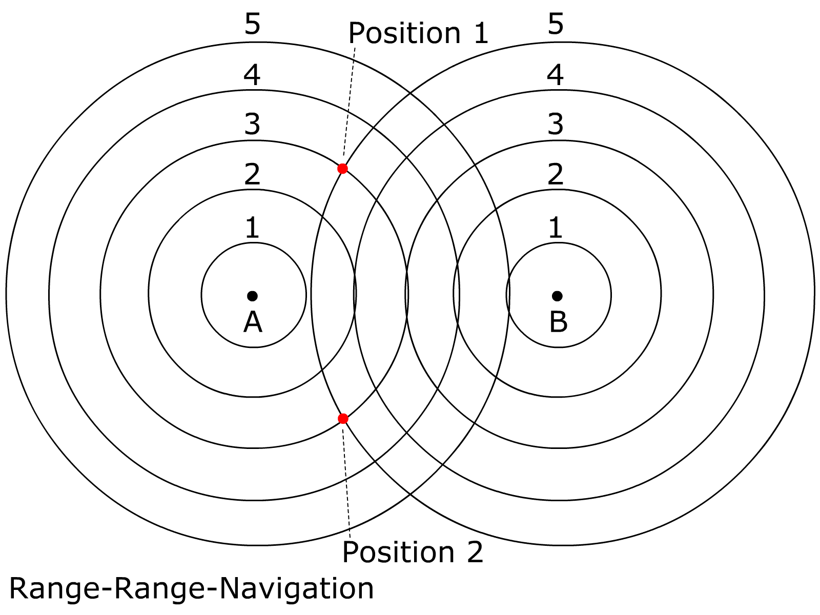 OMEGA Navigationssystem, Funktionsweise